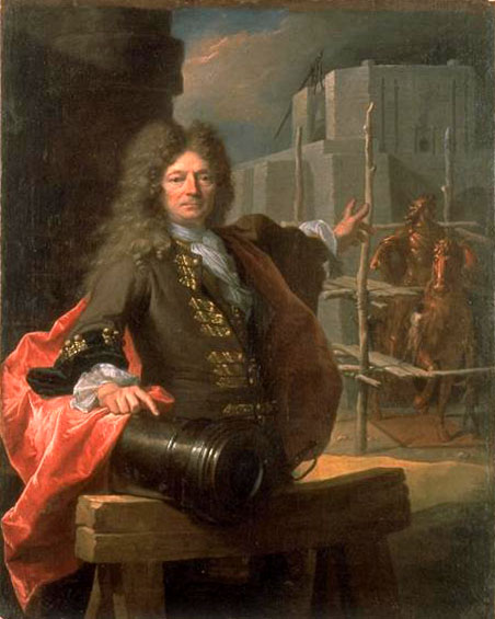 Herrenporträt Johann Balthasar Keller vom Steinbock (1638-1702) von Zürich, Erzgiesser in Paris. (im Hintergrund das von ihm und seinem Bruder 1692 in einem Guss erstellte Reiterstandbild Ludwigs XIV. für die Place Vendôme in Paris)